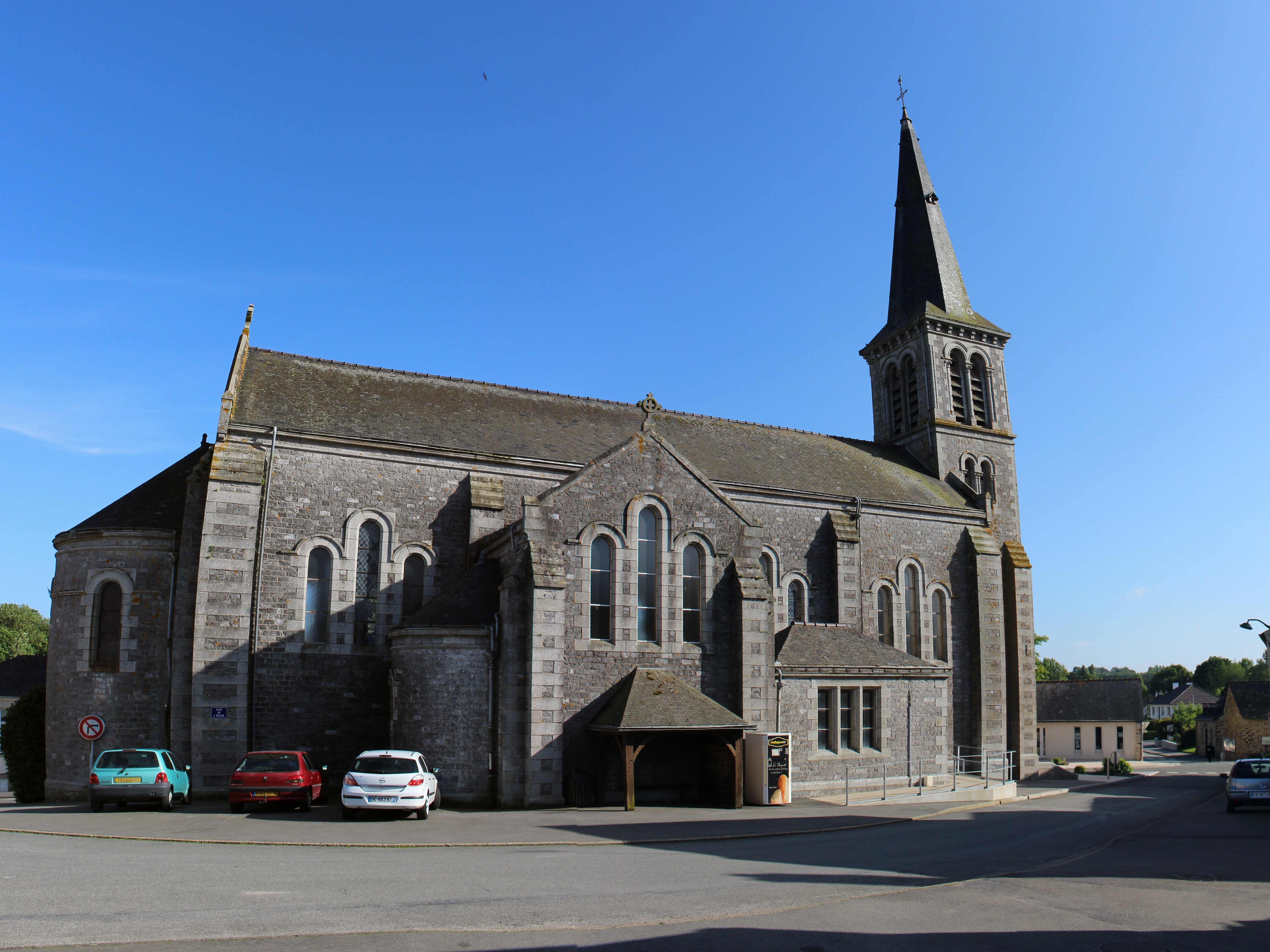 La Brûlatte, Mayenne. Architecte : Eugène Hawke. 1892-1893.